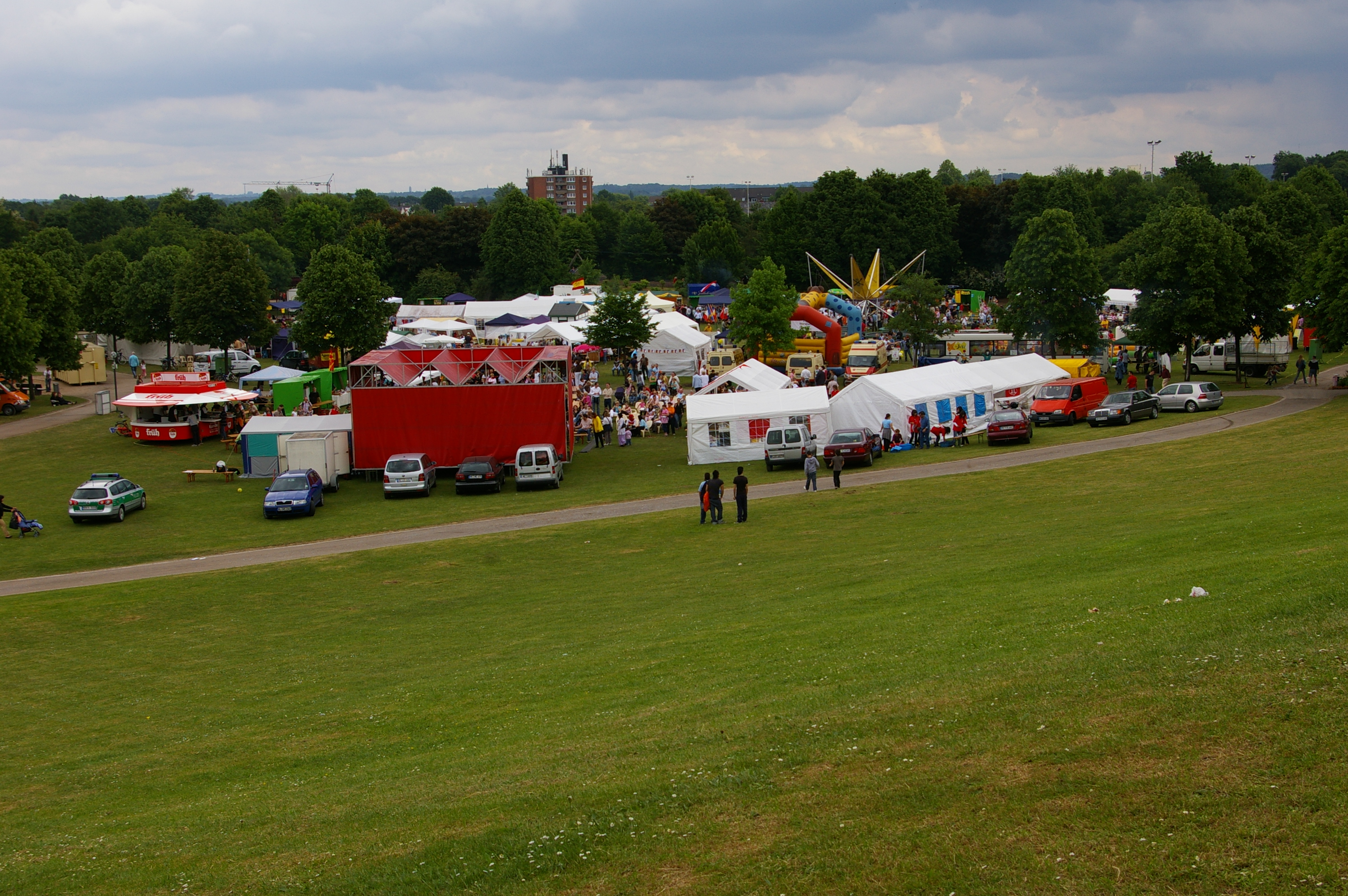 Blick auf die Zeltstadt im Freizeitpark beim Kinderfest